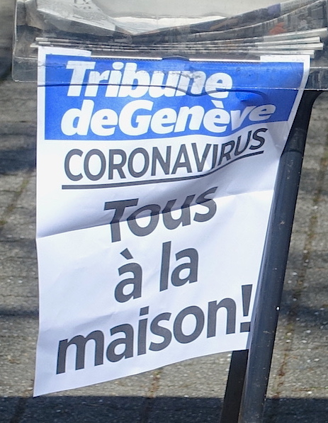 Manchette de la Tribune de Genève, 17 mars 2020, concernant les mesures prises en Suisse face au COVID-19